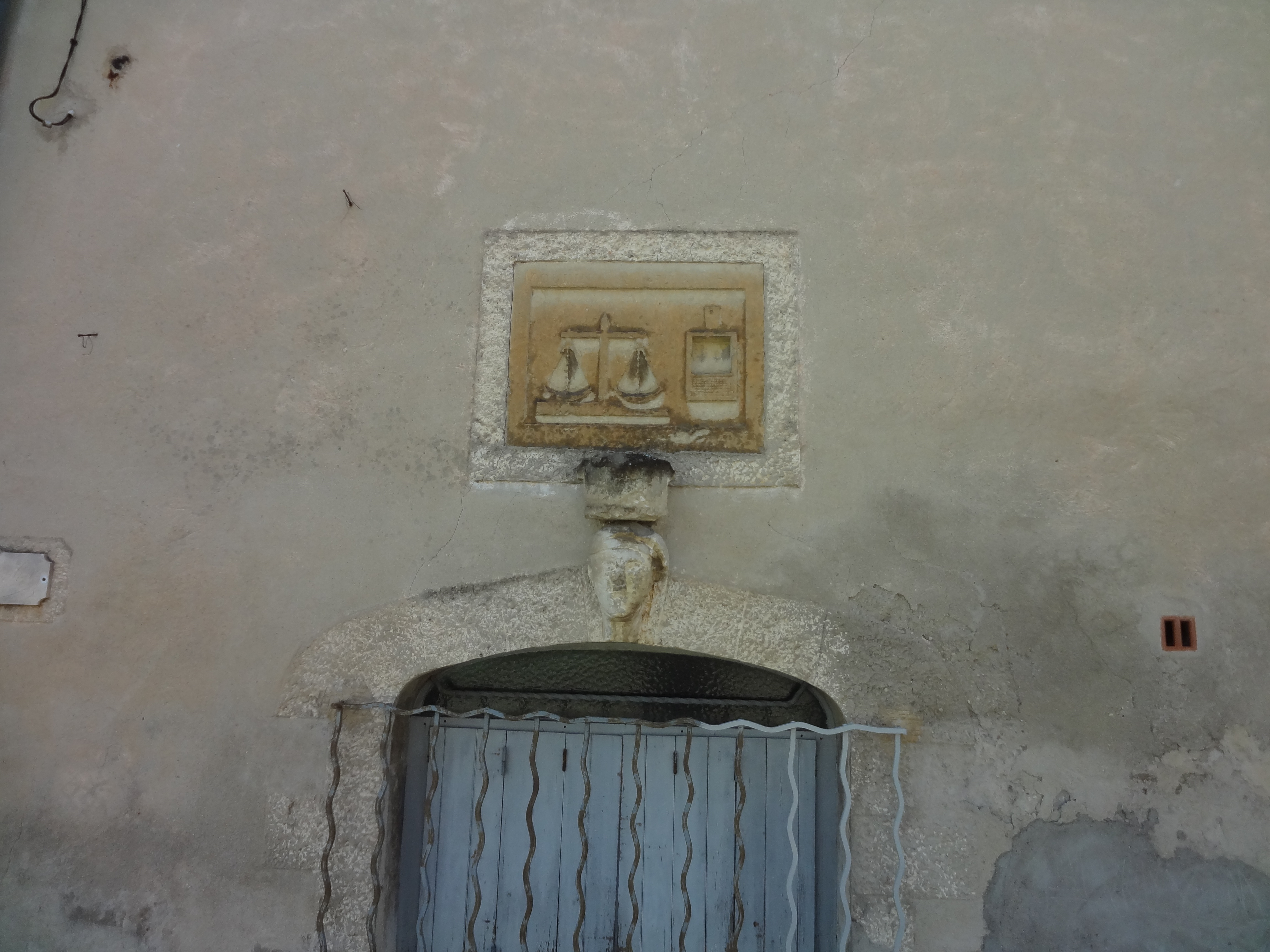 Enseigne de meunier, à Sigonce (ne se trouve pas sur le moulin)